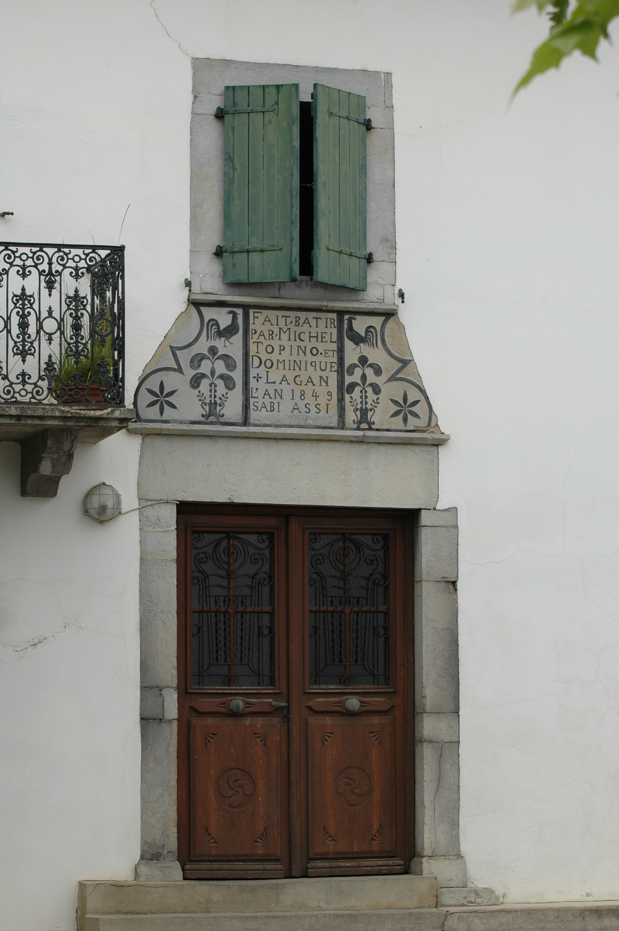 Iholdy, porte au linteau sculpté